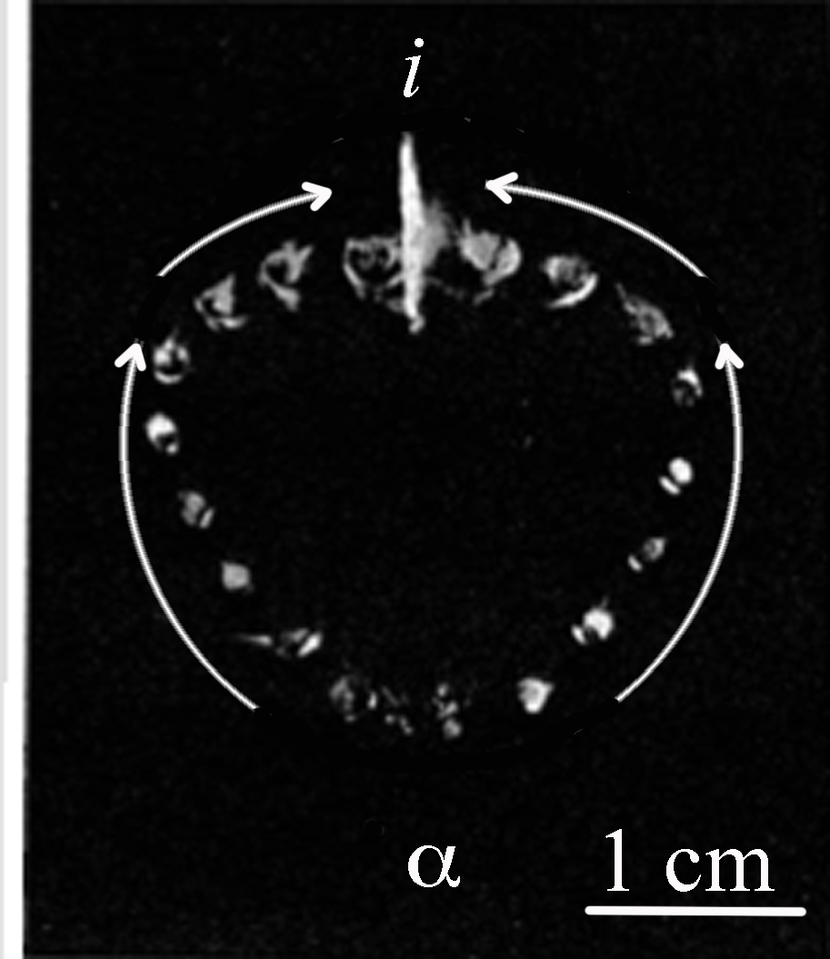 Photo d'une expérience de micropyrotechnie réalisée par Albert Michel-Lévy et Henri Muraour (1934). Des grains d'explosif sont disposés en collier. La mise à feu se fait en a et l'onde de choc fait détoner successivement tous les grains. L'interférence entre les deux branches de l'onde de choc provoque un signal lumineux intense. Modifié d'après un cliché publié aux Comptes Rendus de l'Académie des Sciences et publié avec l'autorisation de l'Académie.